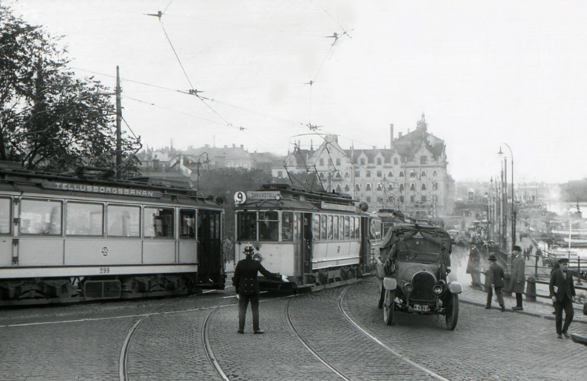 En trafikpolis dirigerar trafiken på Slussen